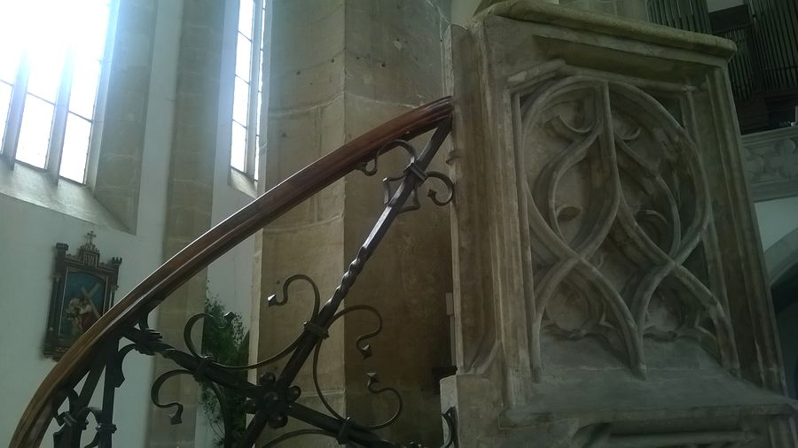 Část schodiště